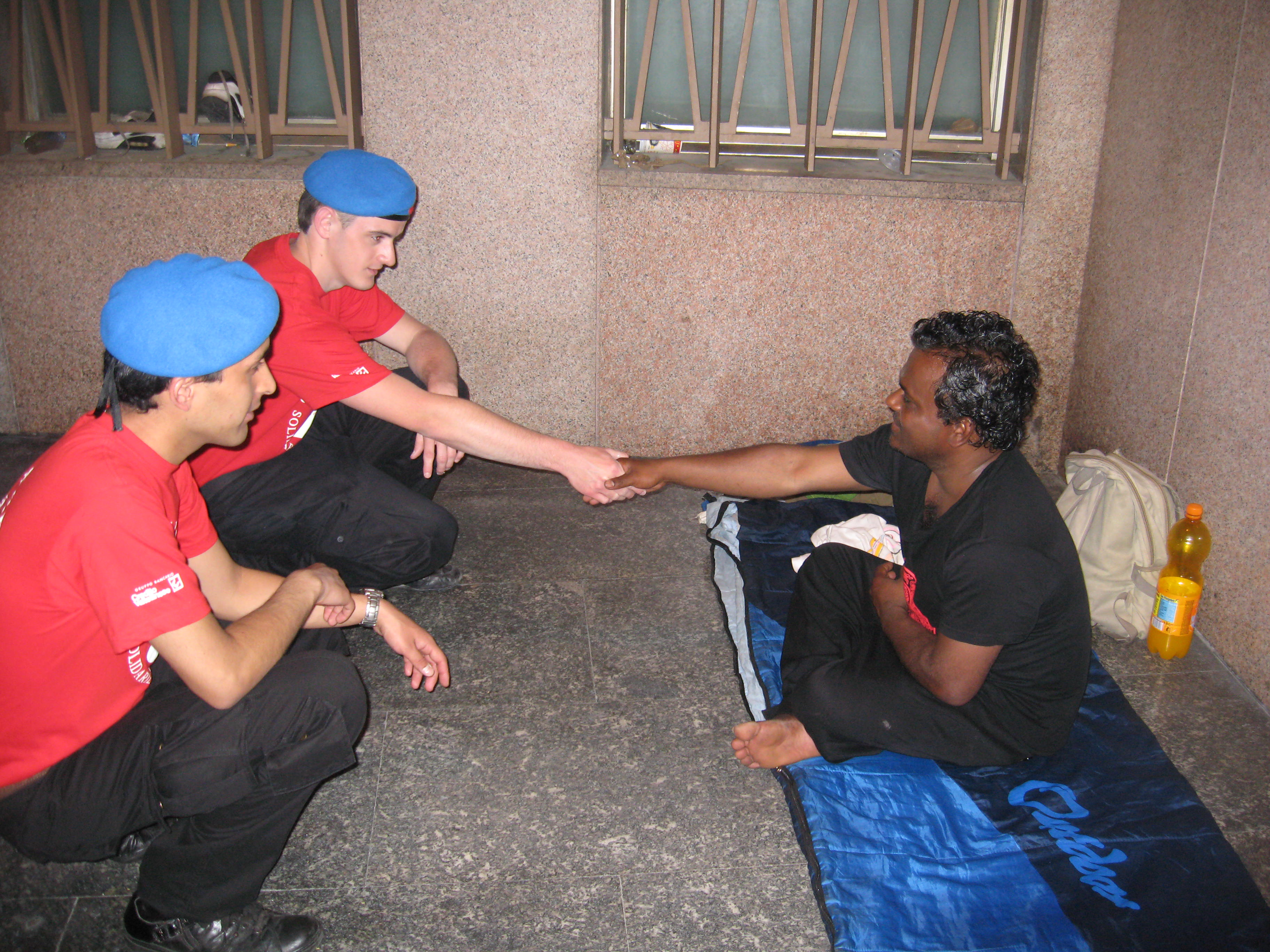 City Angels con clochard